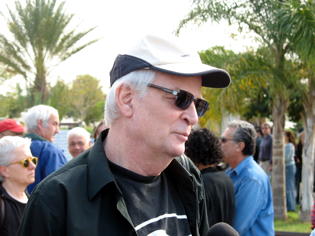 אריק איינשטייןבהלווית עלי מוהר, 2006